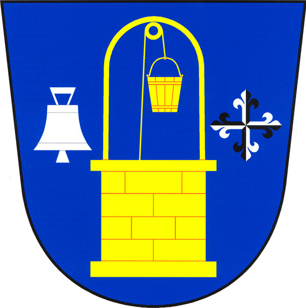 Znak obce Studnice (okres Chrudim)